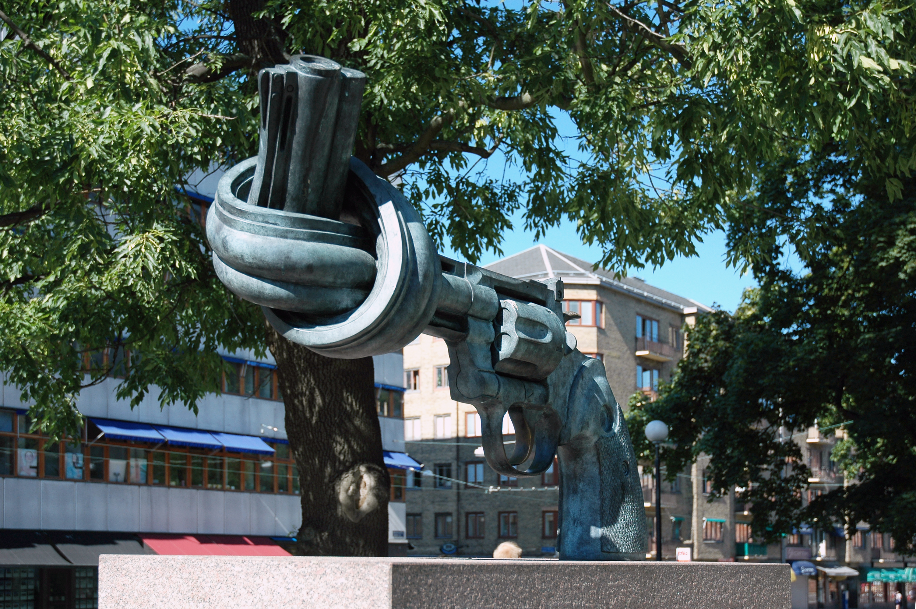 Een standbeeld voor de vrede in Göteborg, Zweden; (en) A statue for peace in Göteborg, Sweden